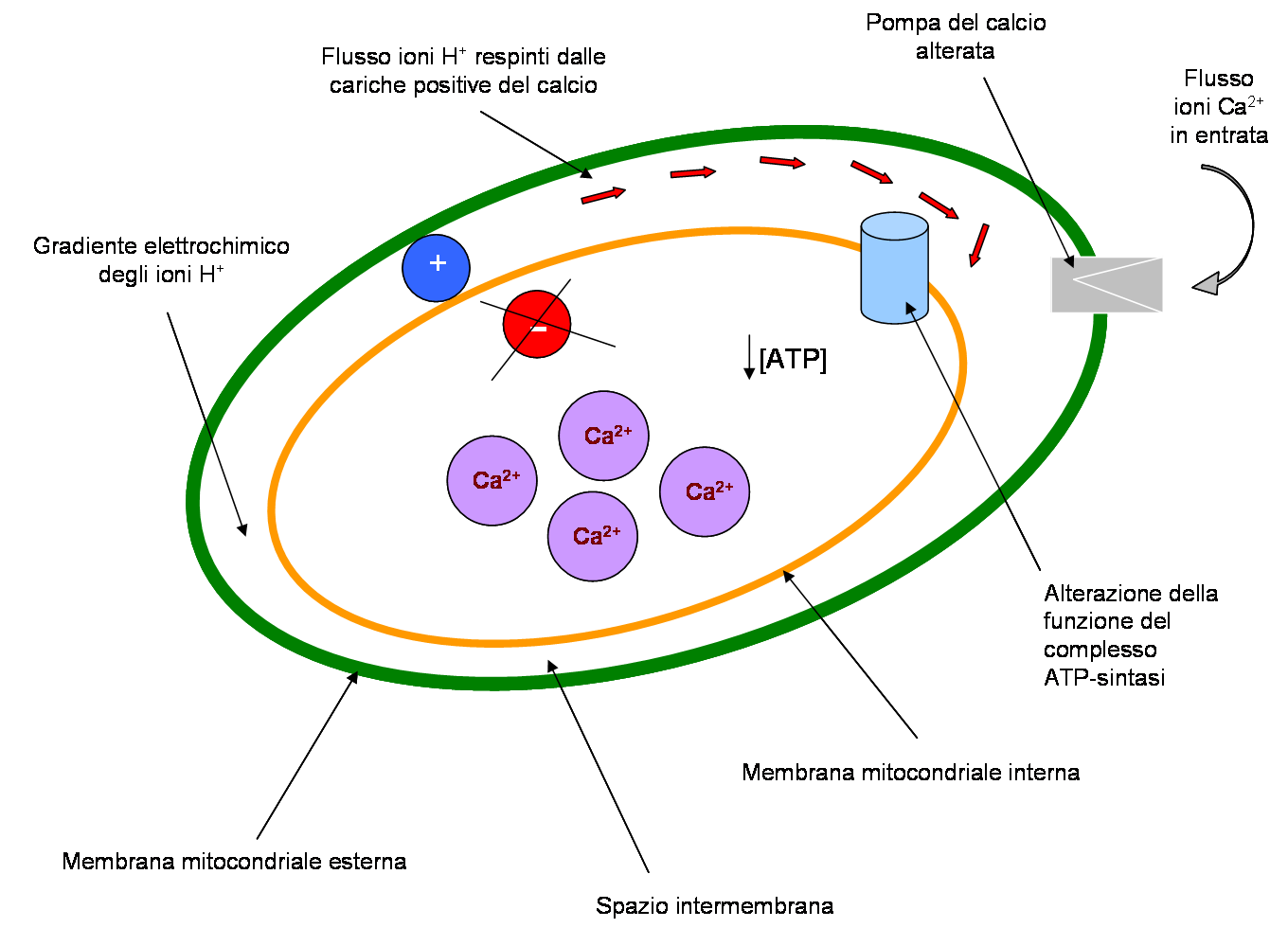 Alterazione del flusso protonico mitocondriale Calcio-dipendente, implicato nella formazione dell'ATP